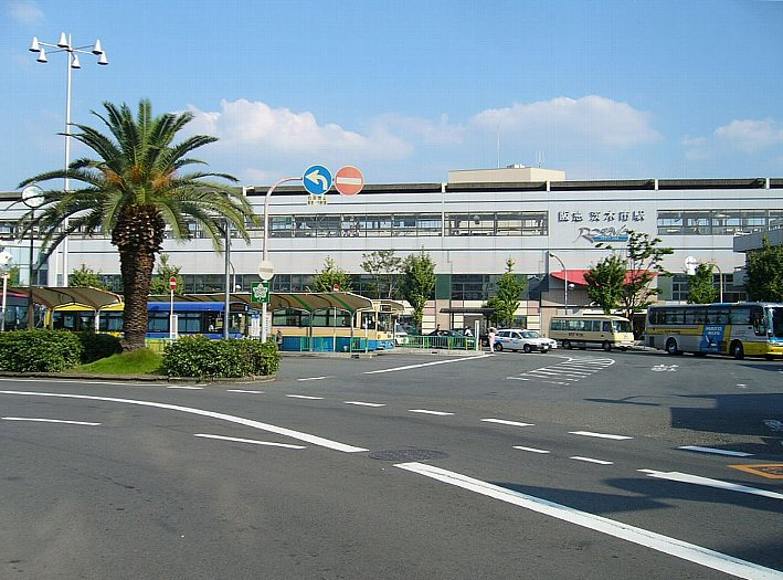 阪急京都本線ja:茨木市駅